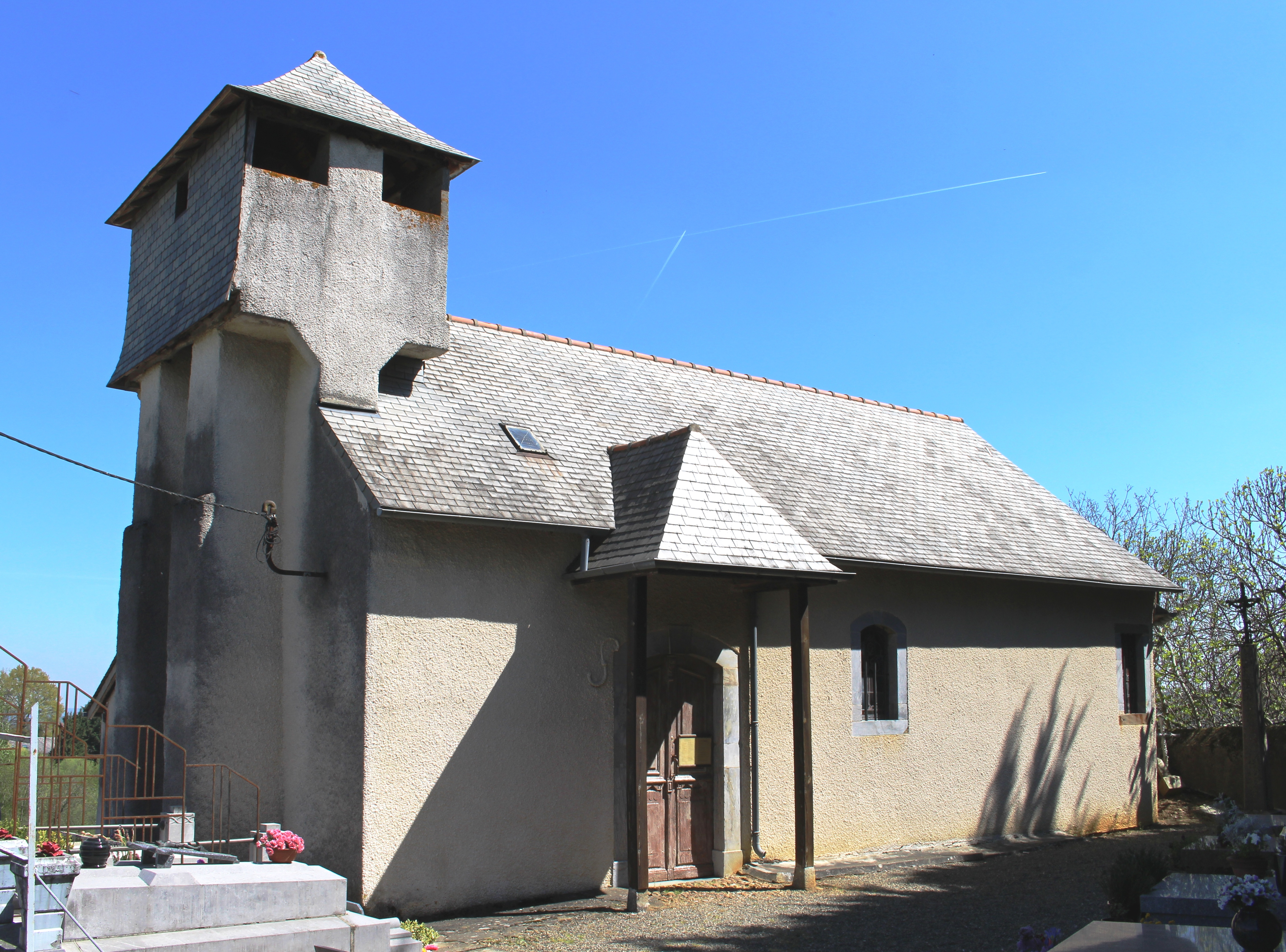 Église Saint-Jean-l'Evangéliste de Fréchou-Fréchet (Hautes-Pyrénées)